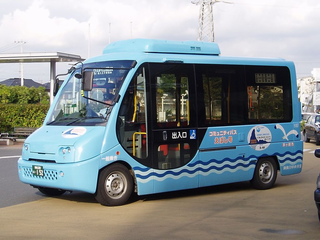 Kanachu Chi107（ち107） Hino VF3ZCPMAC